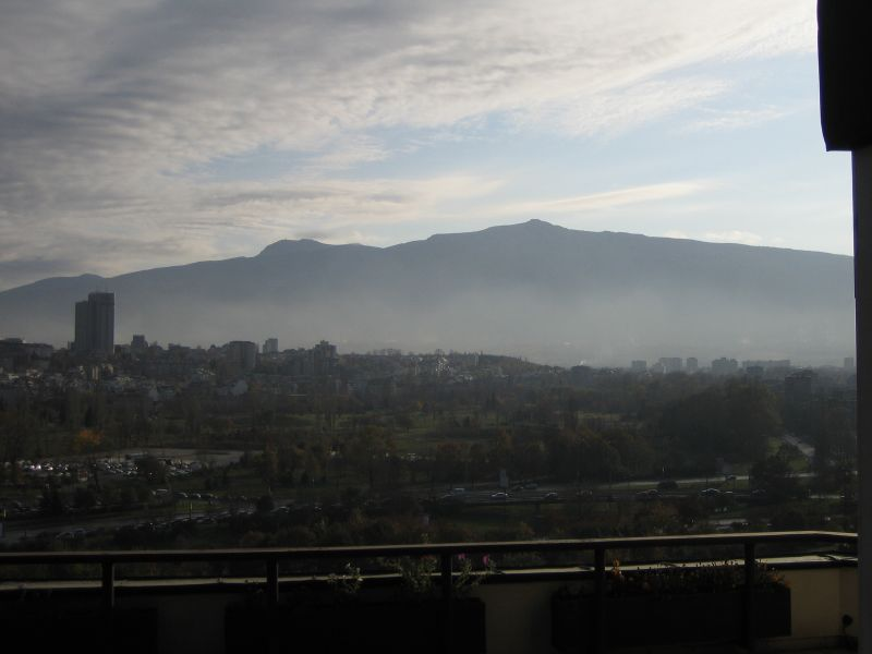 A Vitosa hegyének látképe Szófiából